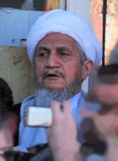 Grand Ayatollah Saanei